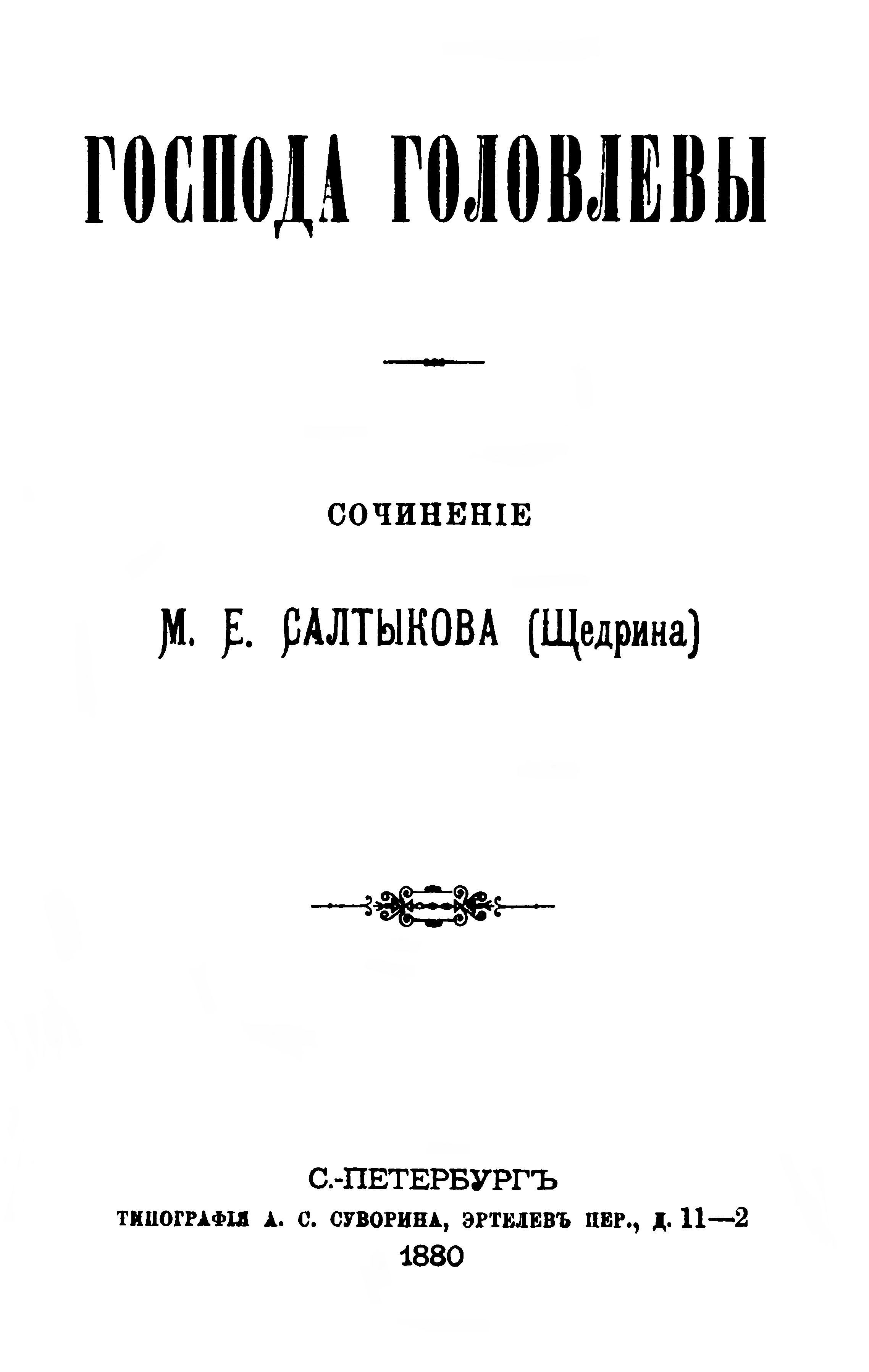 Господа Головлёвы